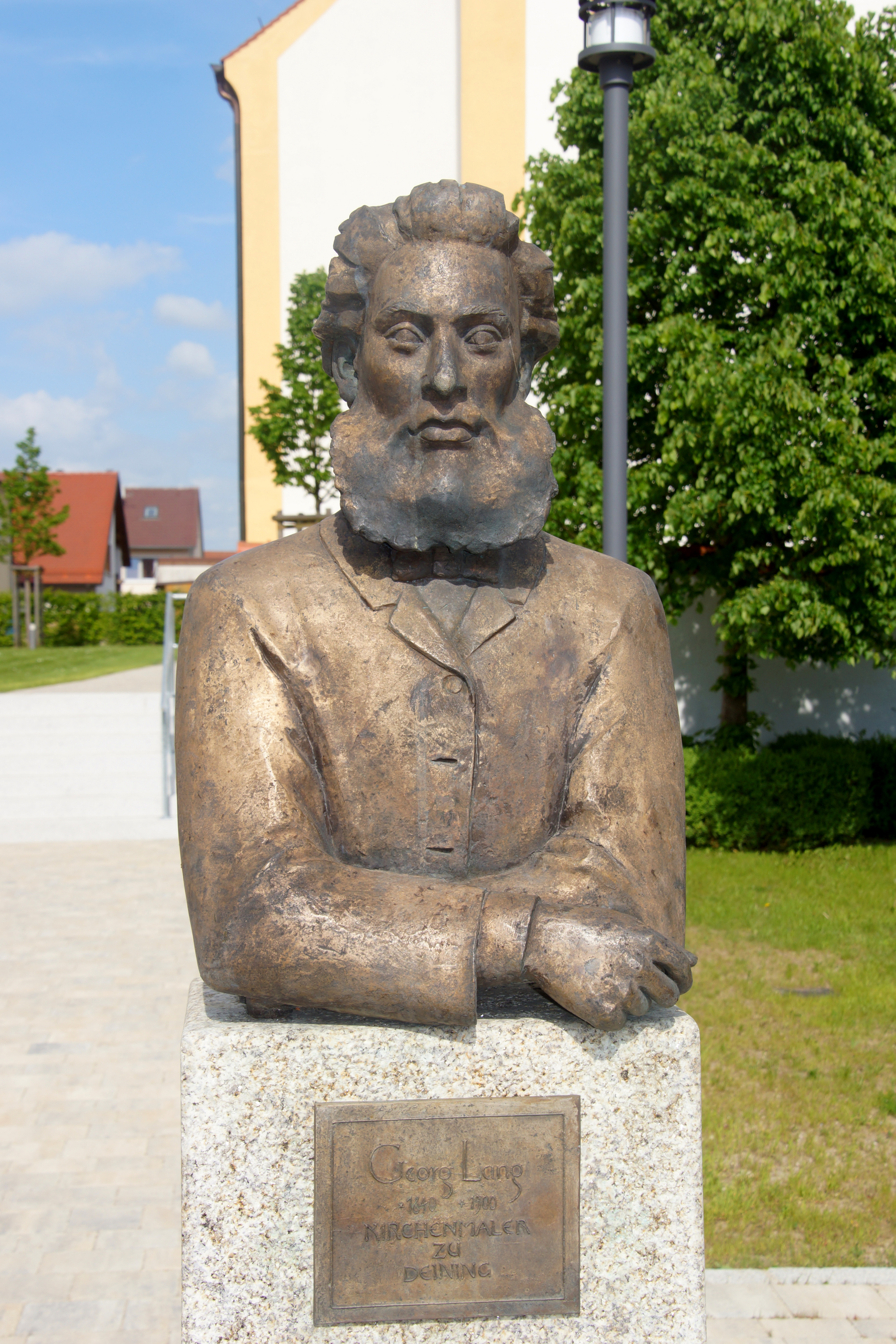 Der dem Kirchenmaler Georg Lang gewidmete Brunnen in Deining